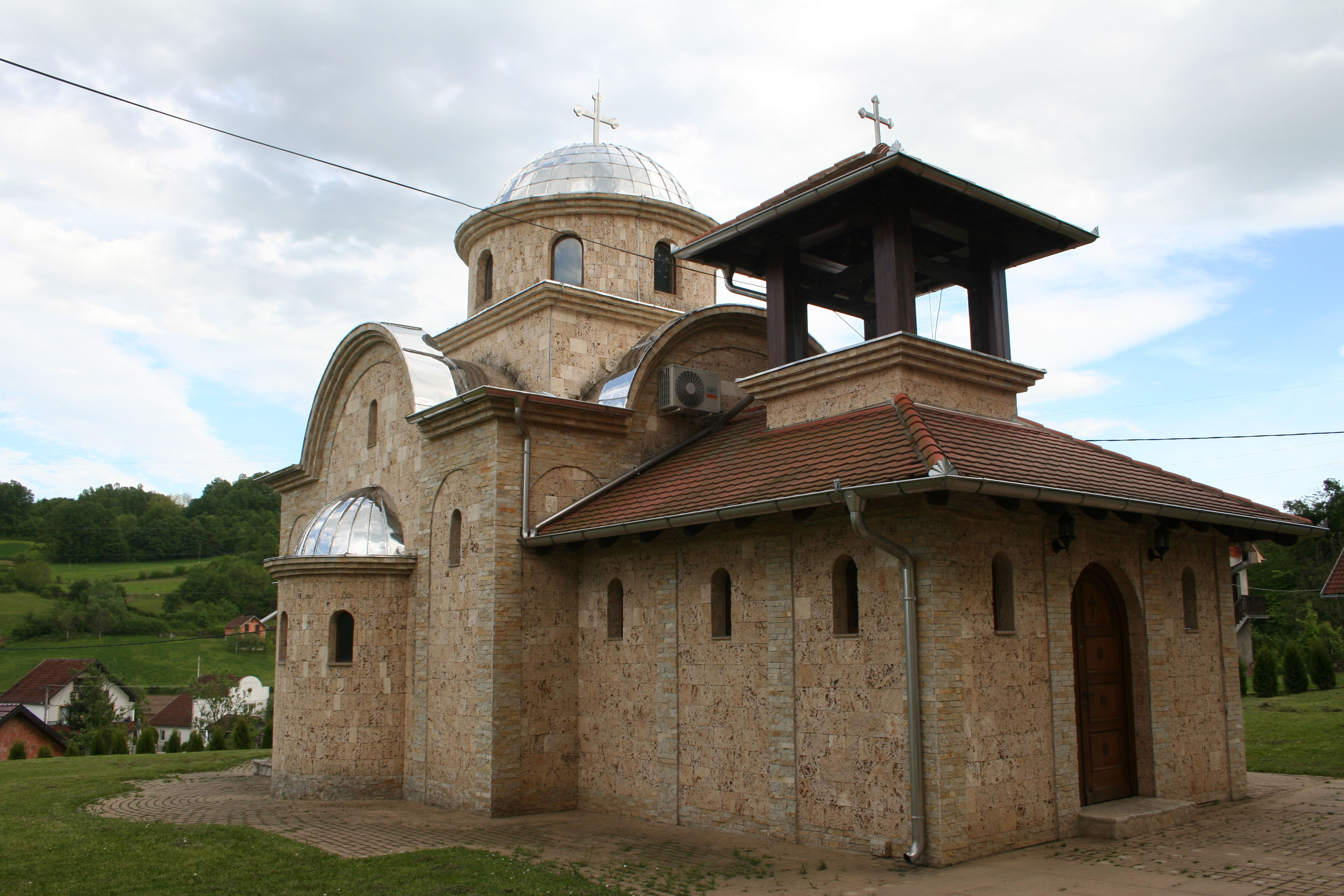 Crkva Sv. Petke Rimljanke, Krasava